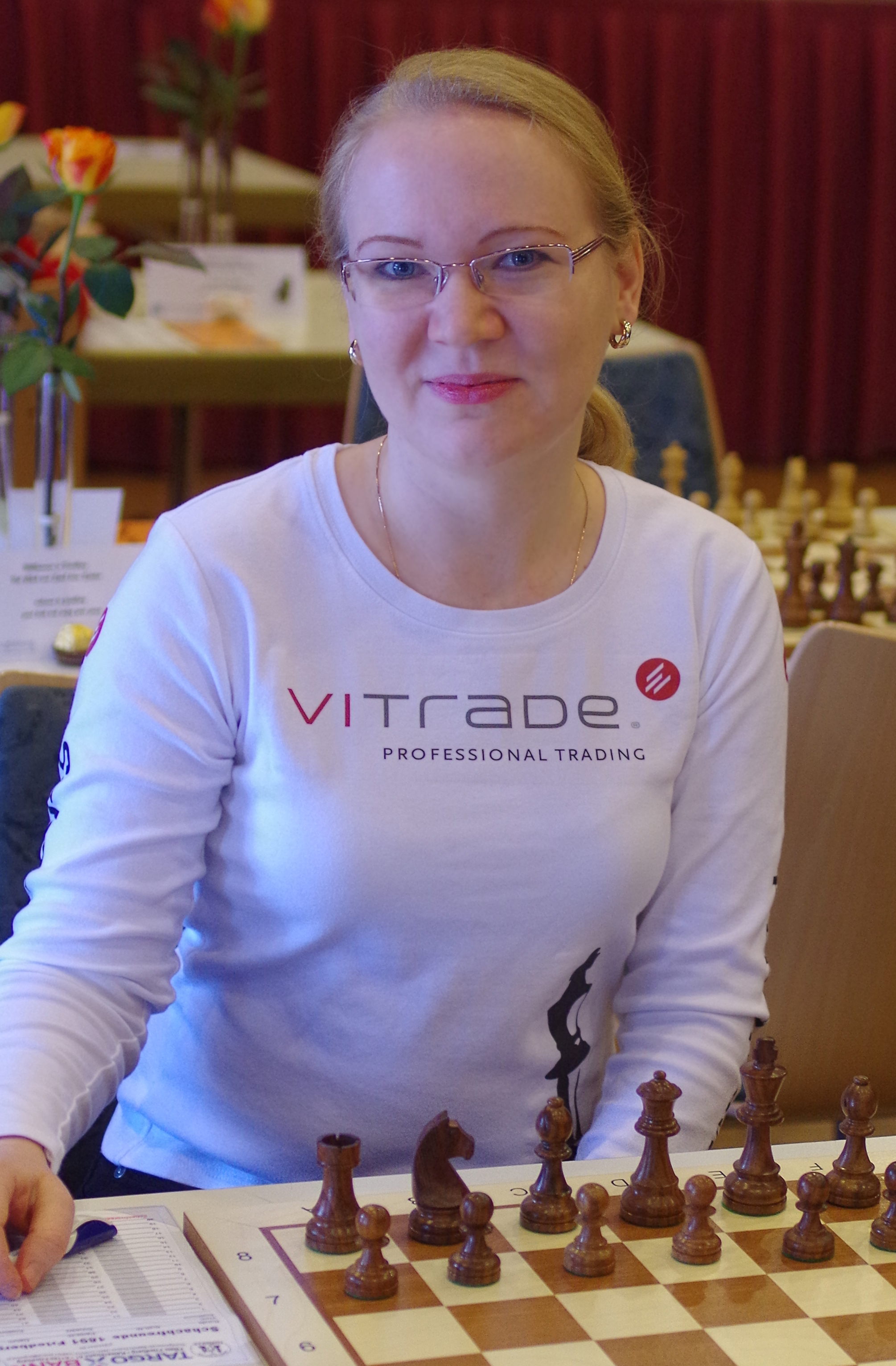 Elena Levushkina beim Heimspiel der 1. Frauenbundesliga Schachfreunde von 1891 Friedberg am 19. Januar 2013